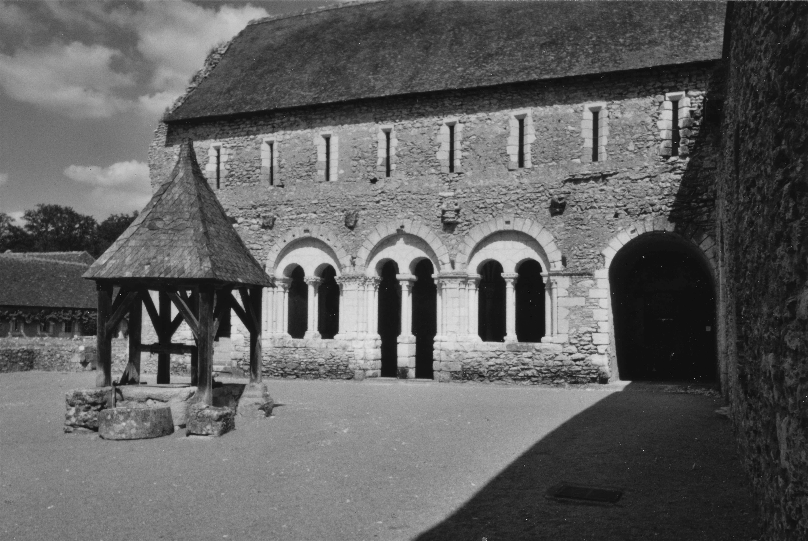 Prieuré de Saint-Jean-du-Grais, vue sur la cour intérieure avec le puits, la salle capitulaire et le dortoir, situé à l'étage